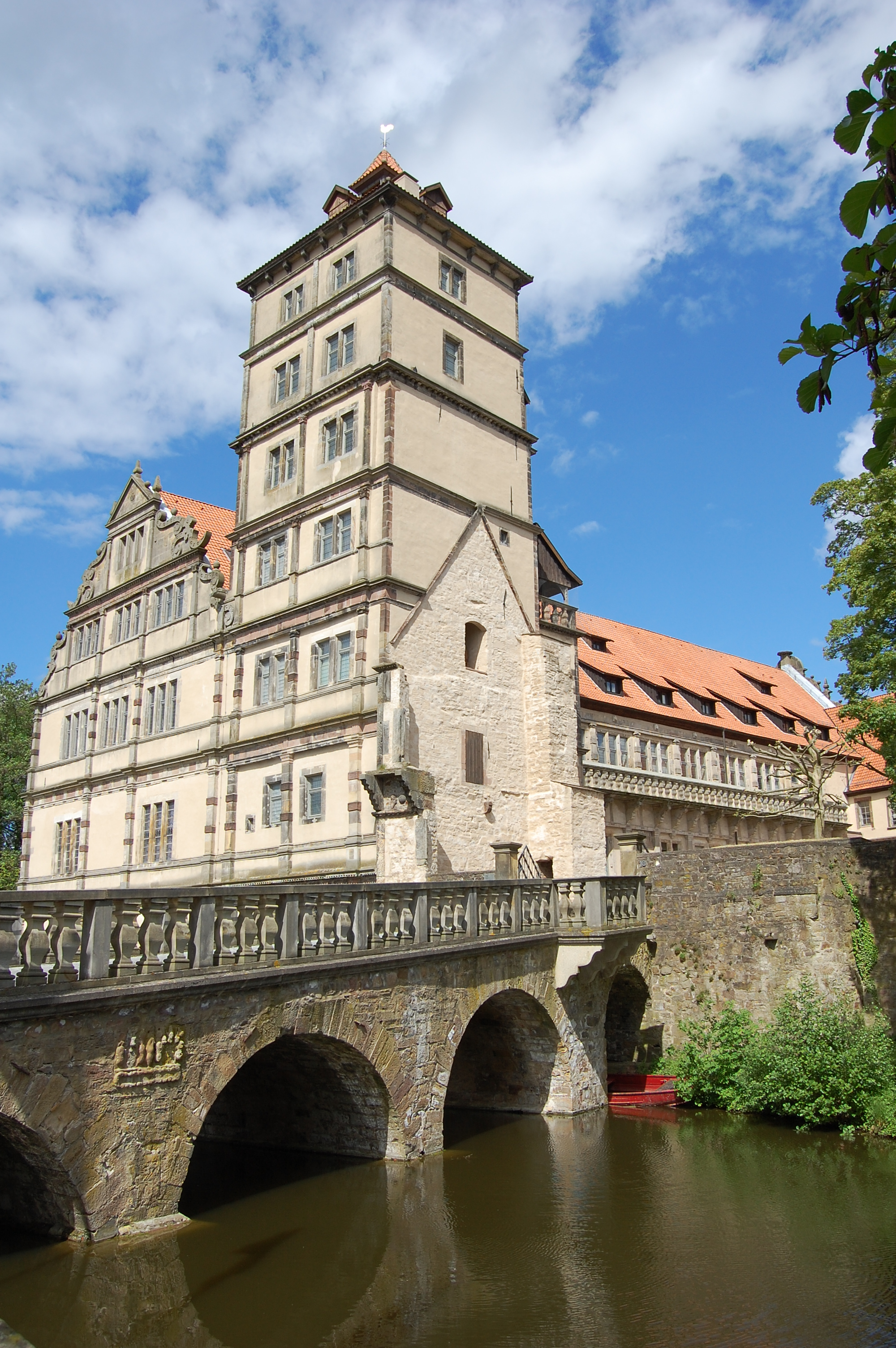 Schloss Brake, Lemgo, Kreis Lippe, Nordrhein-Westfalen, Deutschland